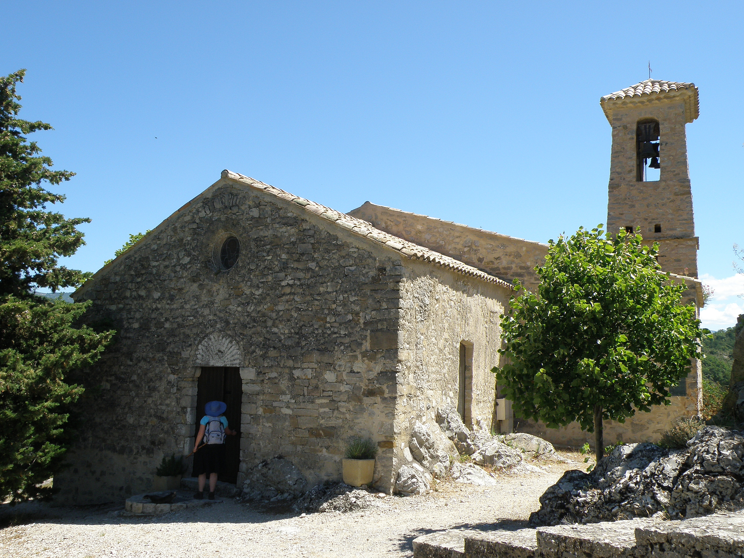 Rochebrune (Drôme). Église Saint-Michel.